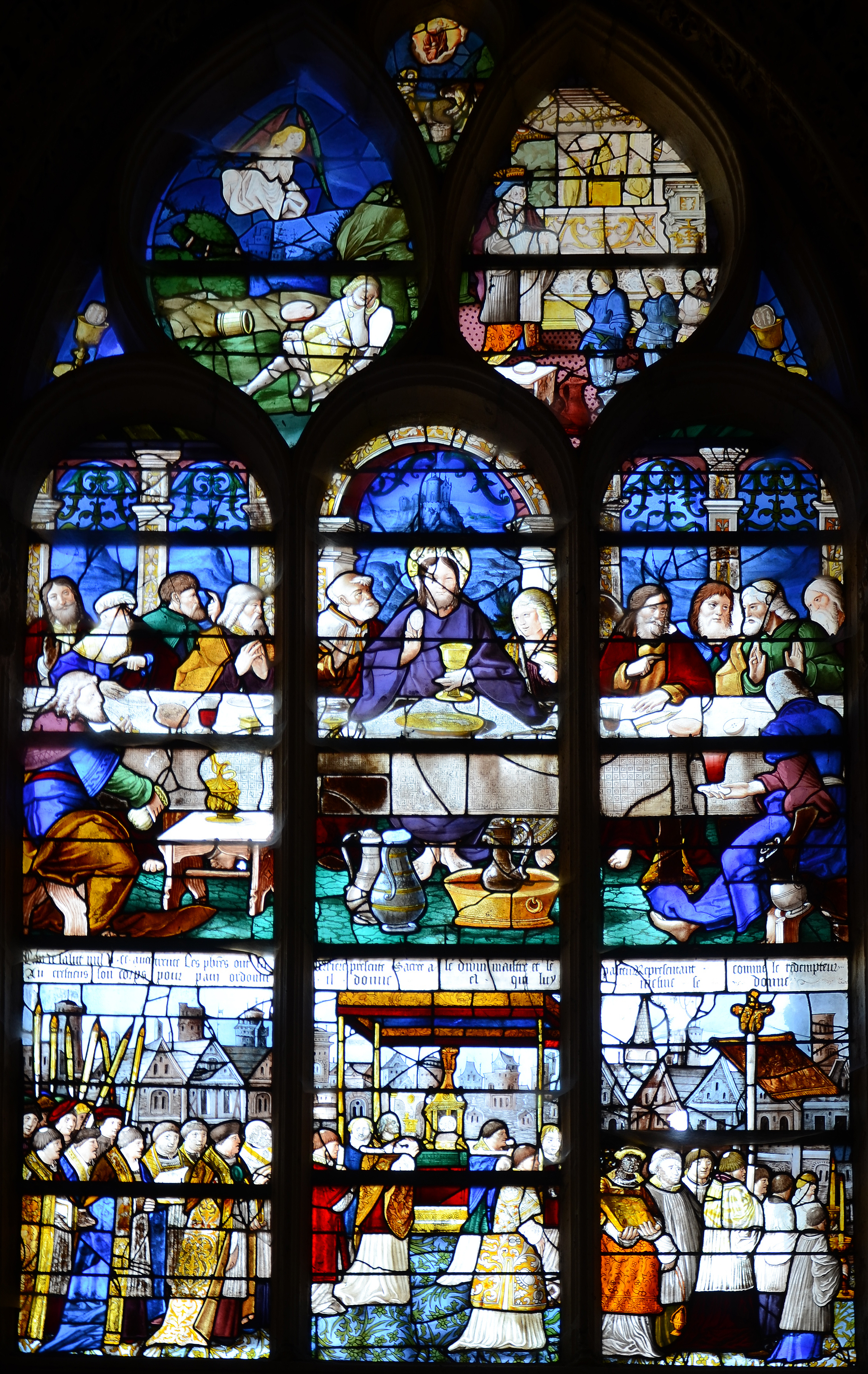 Église Notre-Dame de Caudebec-en-Caux, Seine Maritime, France .